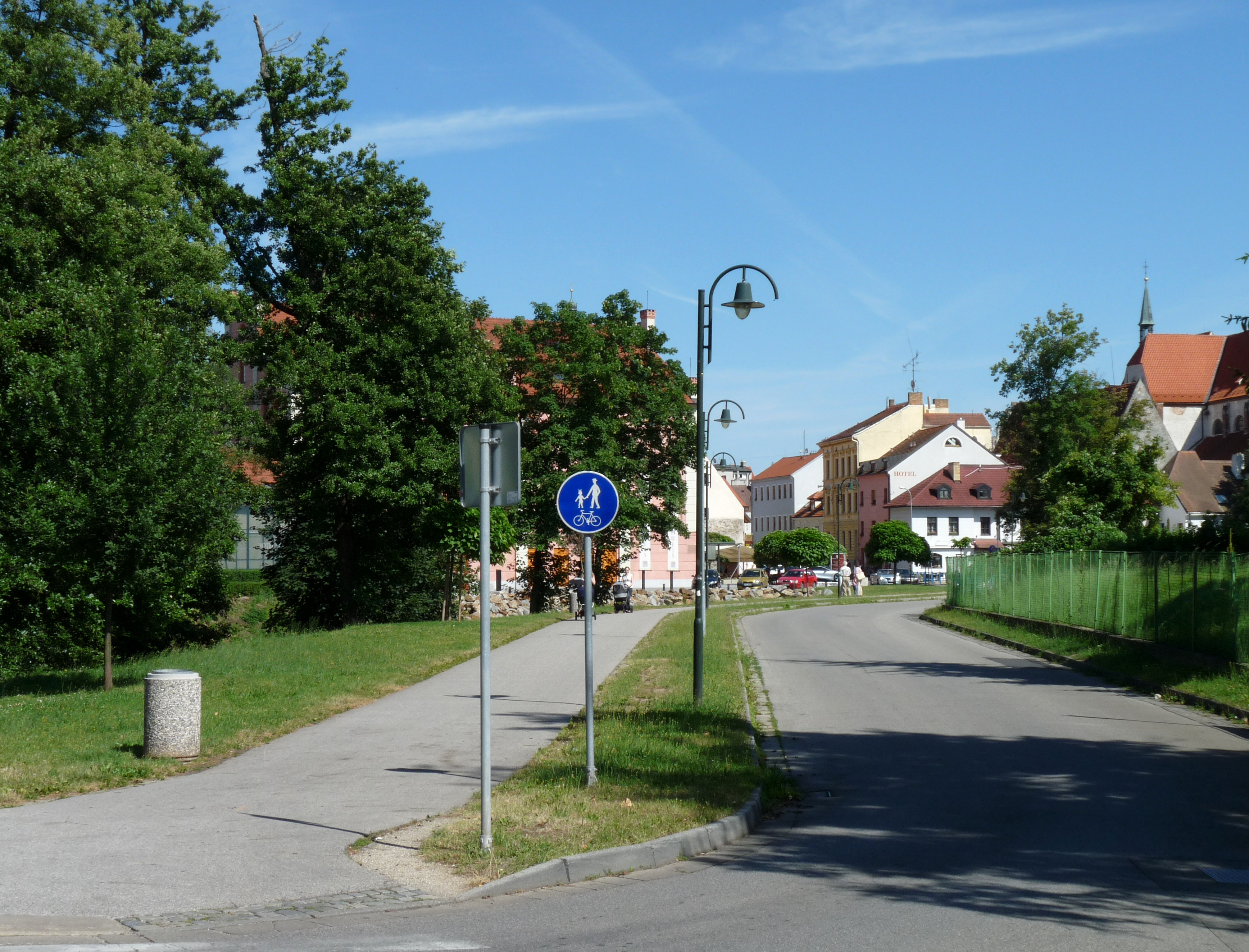 Cyklistická trasa č. 12 vedoucí podél Mlýnské stoky, České Budějovice.